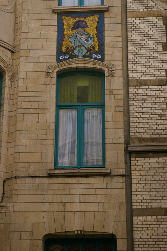 Waterloostraat 30, Zurenborg area of Antwerp